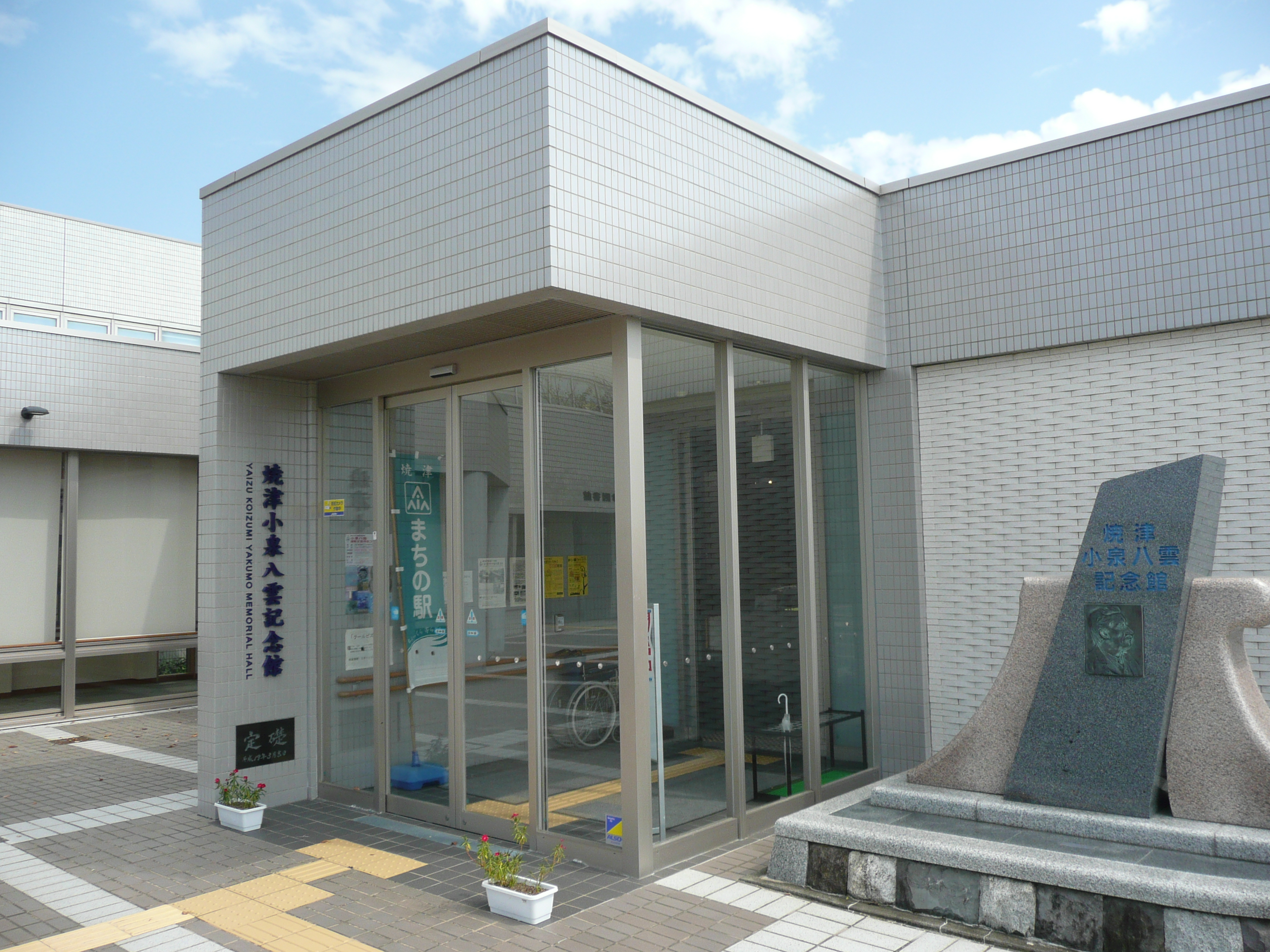 焼津小泉八雲記念館